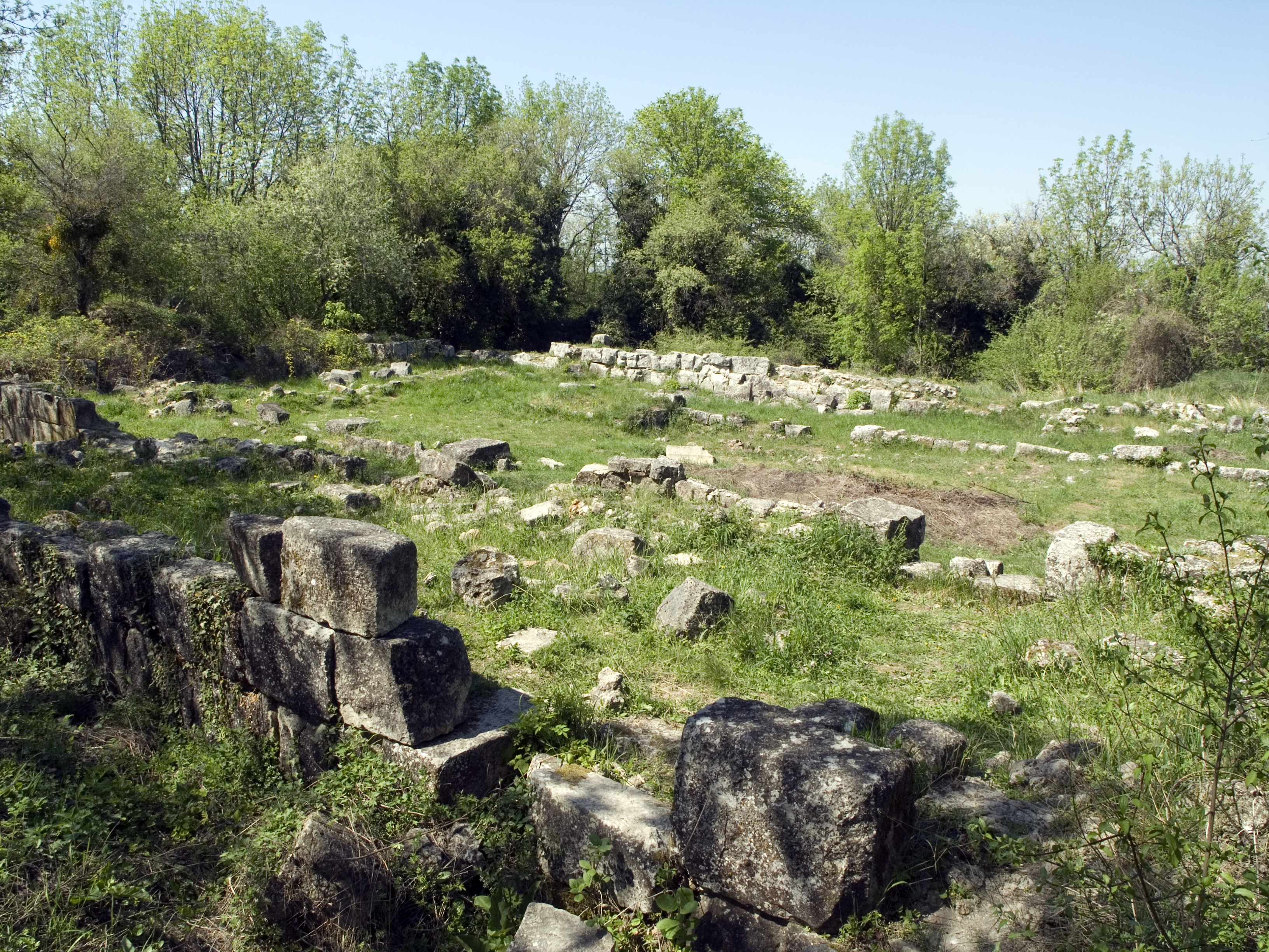 Крим - Мангуп-Кале